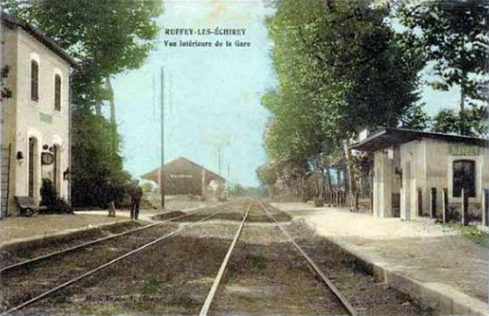 La gare de Ruffey dans les années 1910. Avec son bâtiment voyageurs à deux ouverture, un abris de quai et une halle à marchandises.